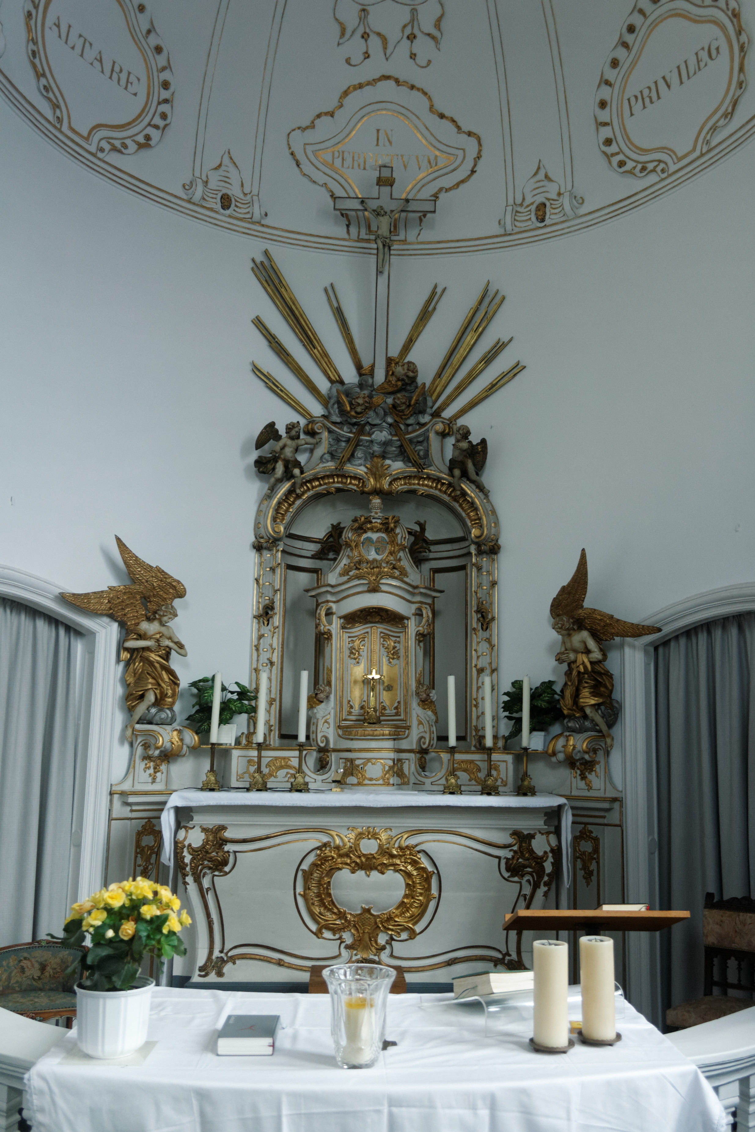 Altar der Kapelle Nispert